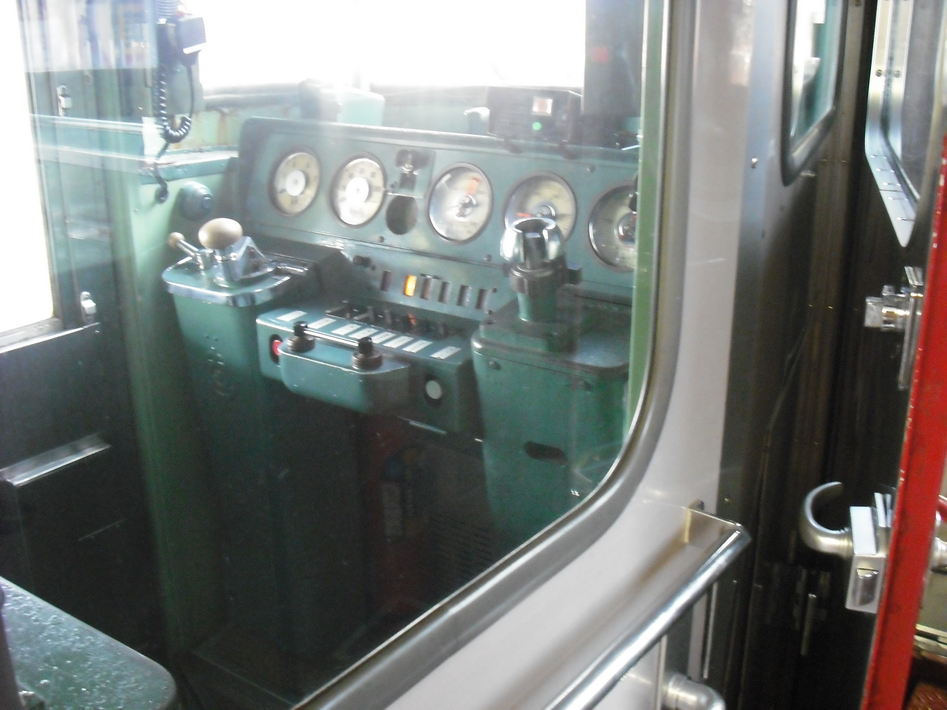 711系運転台の様子、岩見沢駅停車中に撮影